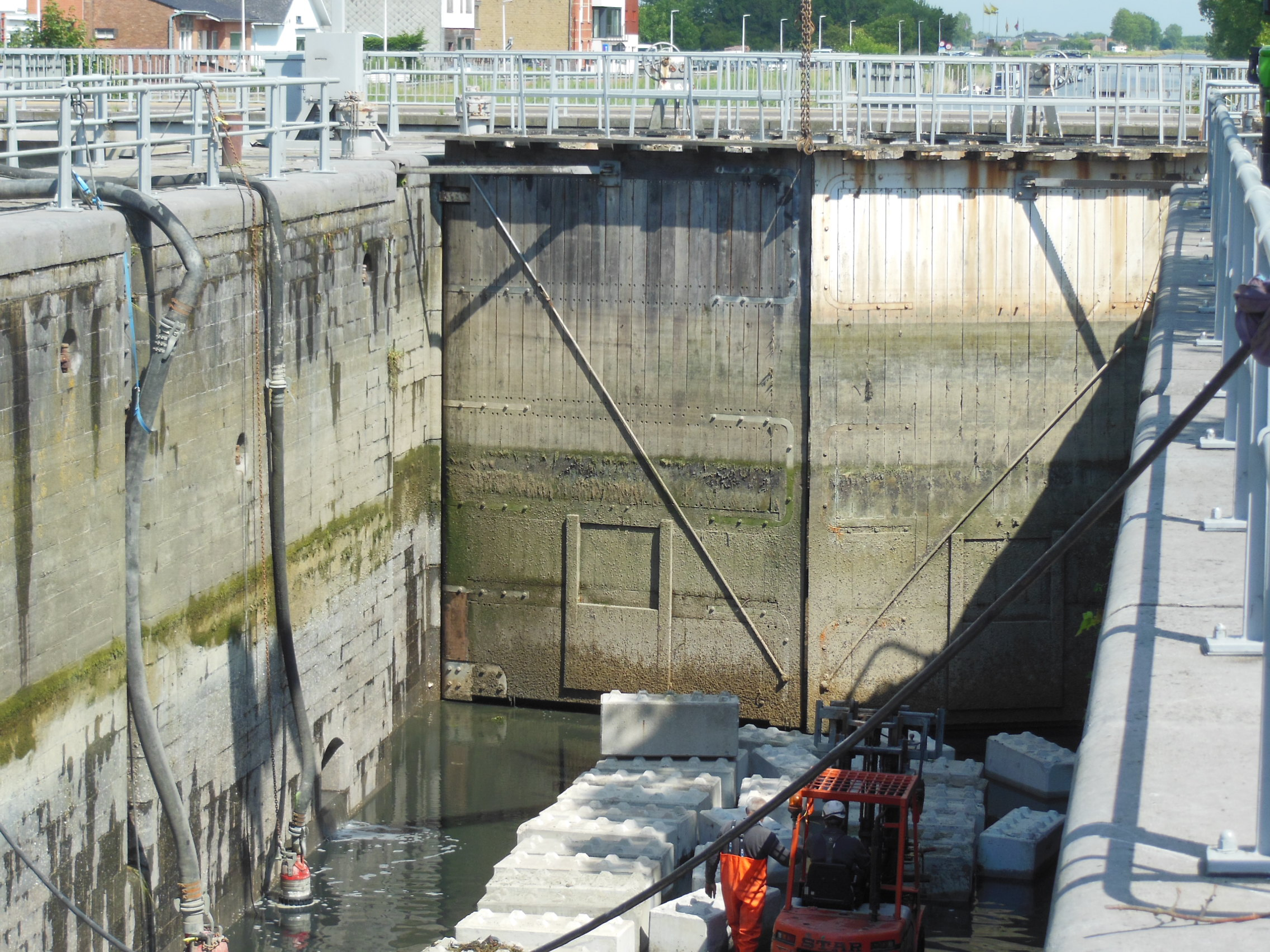 Rinket in de oude bovendeur van de Iepersluis